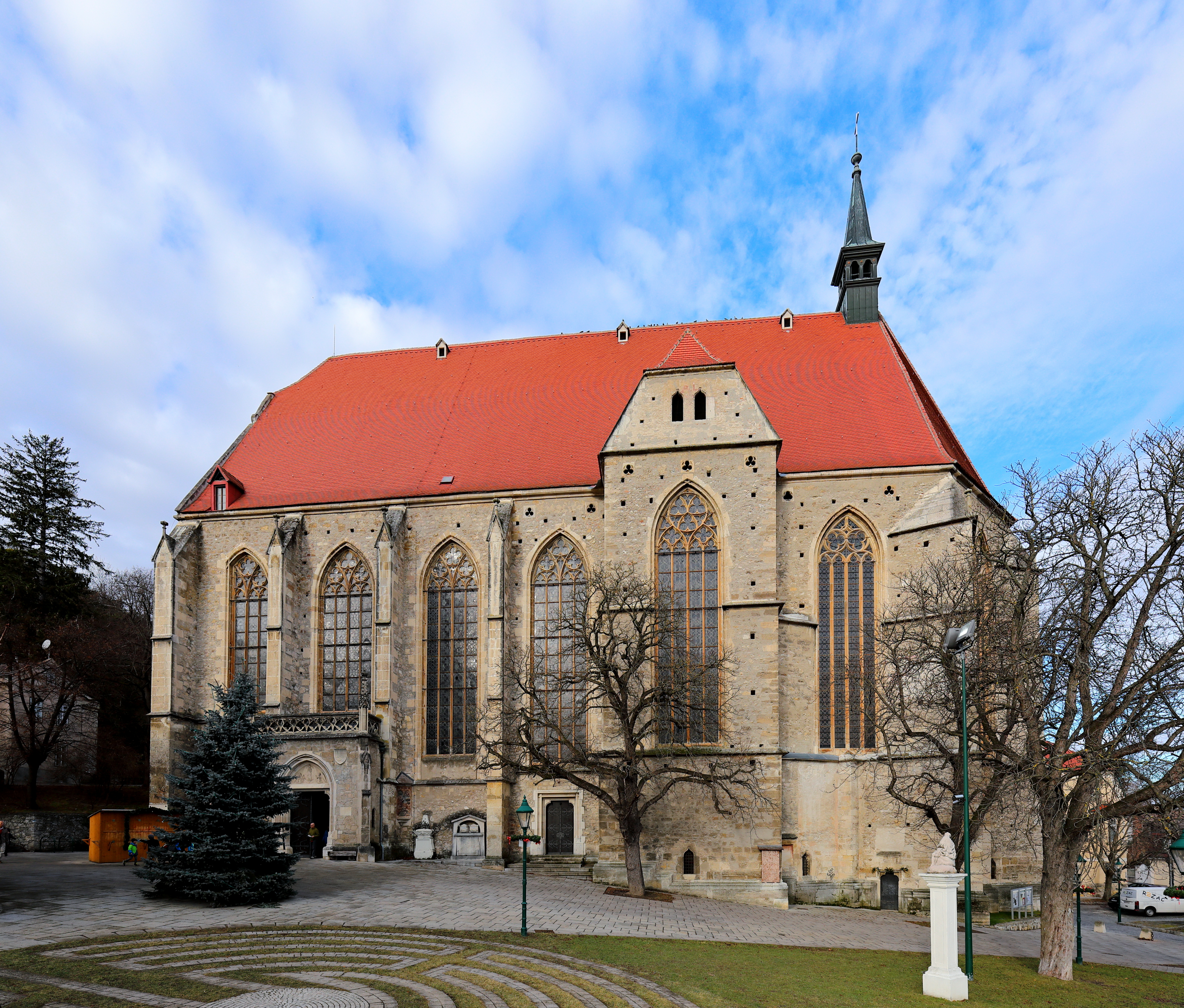 Die Südansicht der röm.-kath. Pfarrkirche St. Othmar in der niederösterreichischen Stadt Mödling und davor ein Pieta-Pfeiler aus dem Jahr 1694.Die dreischiffige, gotische Hallenkirche wurde von 1454 bis 1523 errichtet. Nach Zerstörung der Kirche 1529 durch die Osmanen wurde das Dach und Gewölbe erst im 17. Jahrhundert wieder hergestellt. 1683 erfolgte eine neuerliche Zerstörung. Der heutige Dachstuhl wurde 1690 hergestellt. Von 1875 bis 1897 erfolgte eine Generalsanierung und Regotisierung. Dabei wurden unter anderem die seit der Barockzeit vermauerten Fenster wieder freigelegt.